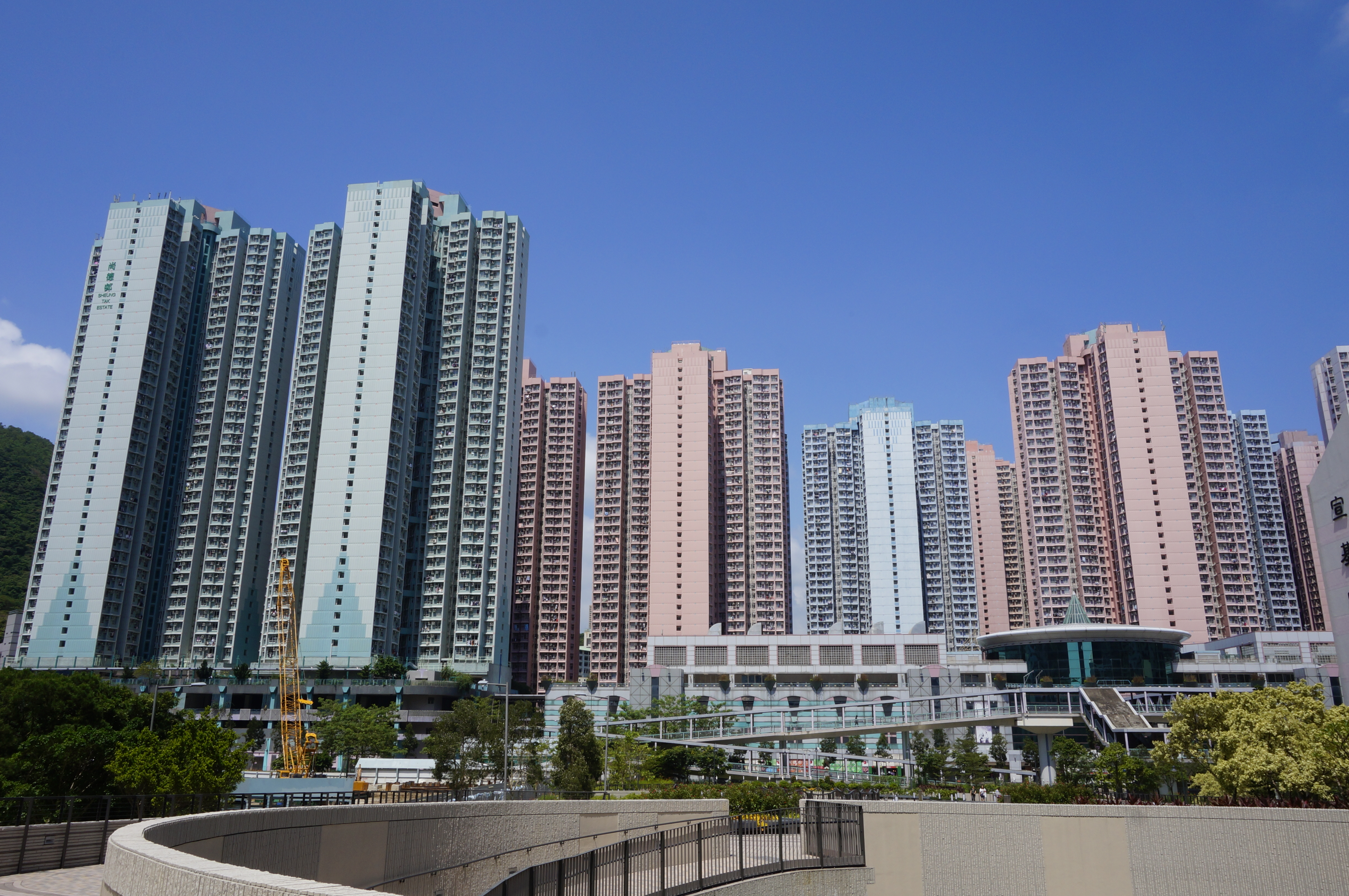 尚德邨各座大廈